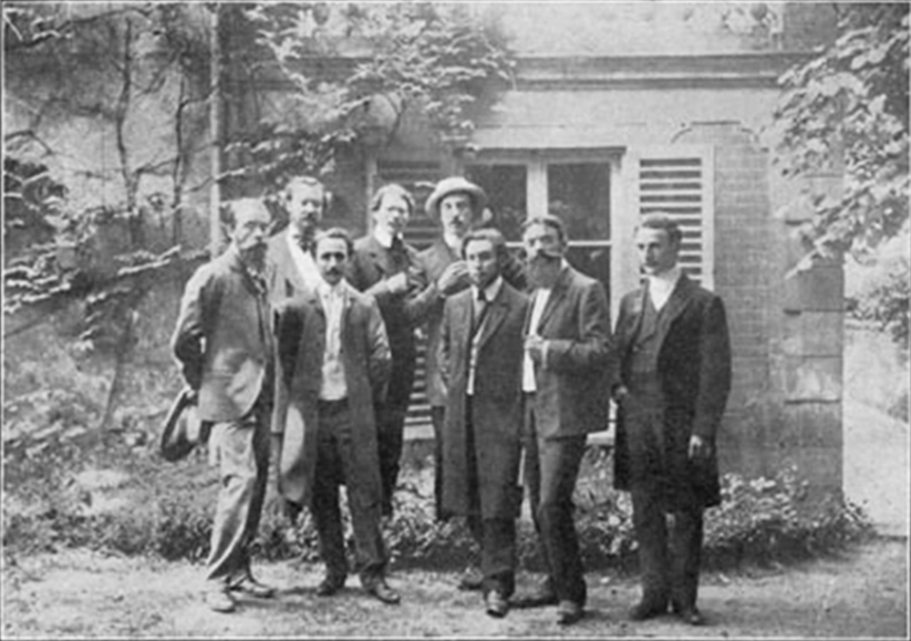 Les membres de l’Abbaye de Créteil, 1906 Premier plan : Charles Vildrac, René Arcos, Albert Gleizes, Henri-Martin Barzum, Alexandre Mercereau; Second plan : Georges Duhamel, Berthold Mahn, d'Otémar